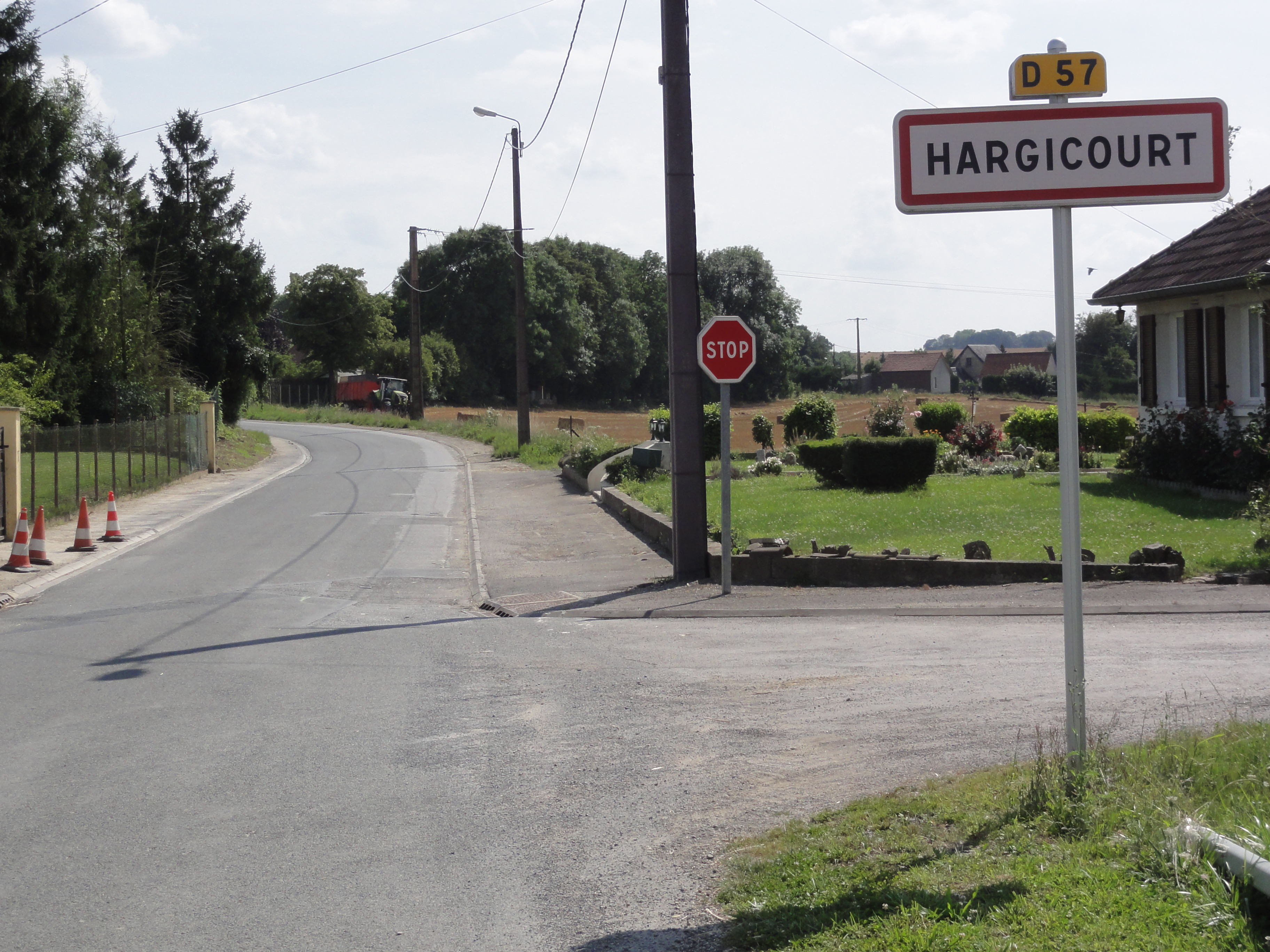 Hargicourt (Aisne) city limit sign